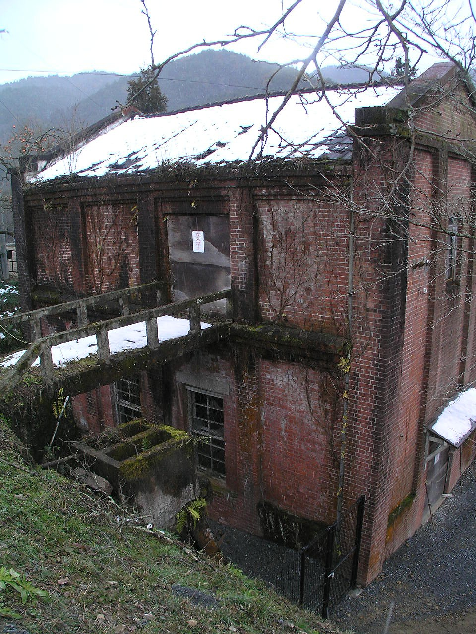 丹波竜の発見された現場すぐそばの篠山川の旧・上久下村営水力発電所